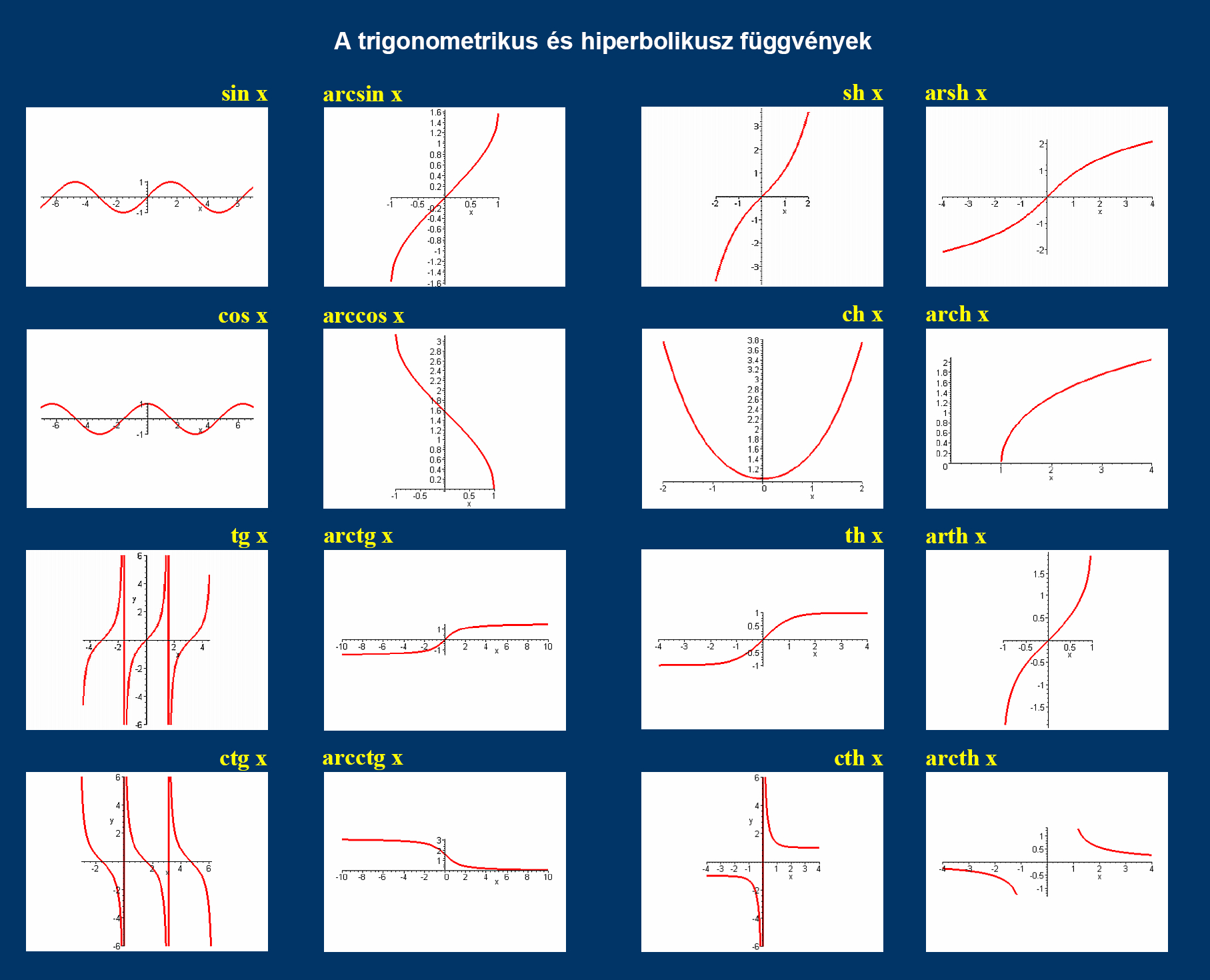 A trigonometrikus és hiperbolikusz függvények képei (+ inverzek)